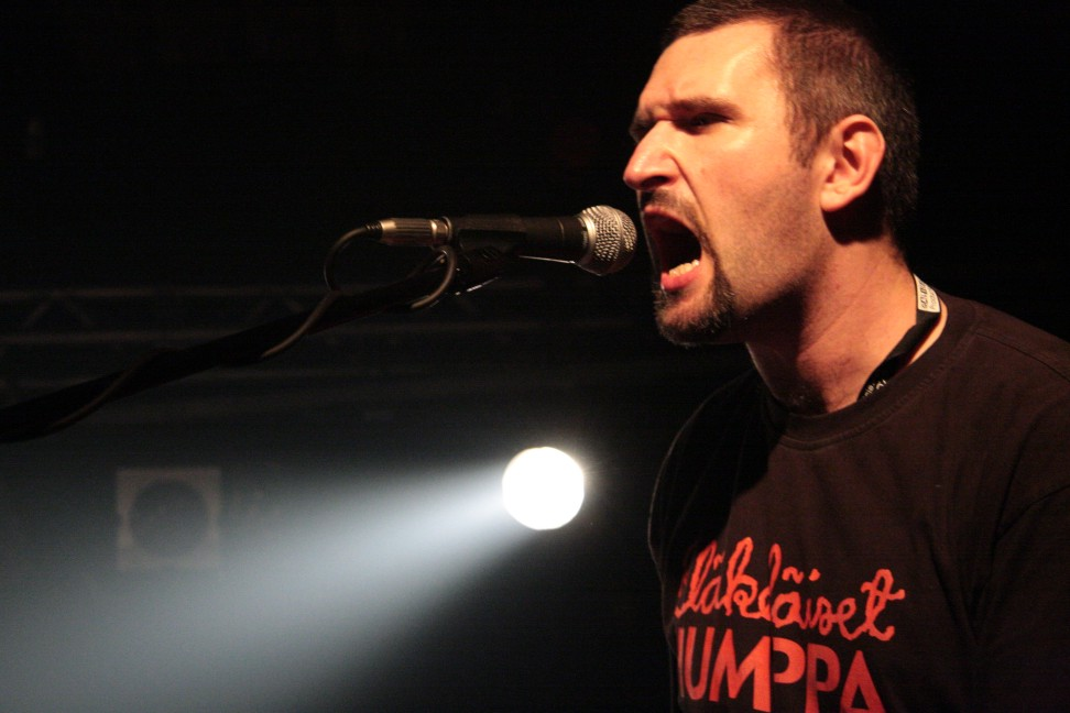 Dr Yry (Krzysztof Radzimski) w czasie koncertu El Dupy w klubie Progresja w Warszawie 01.02.2008